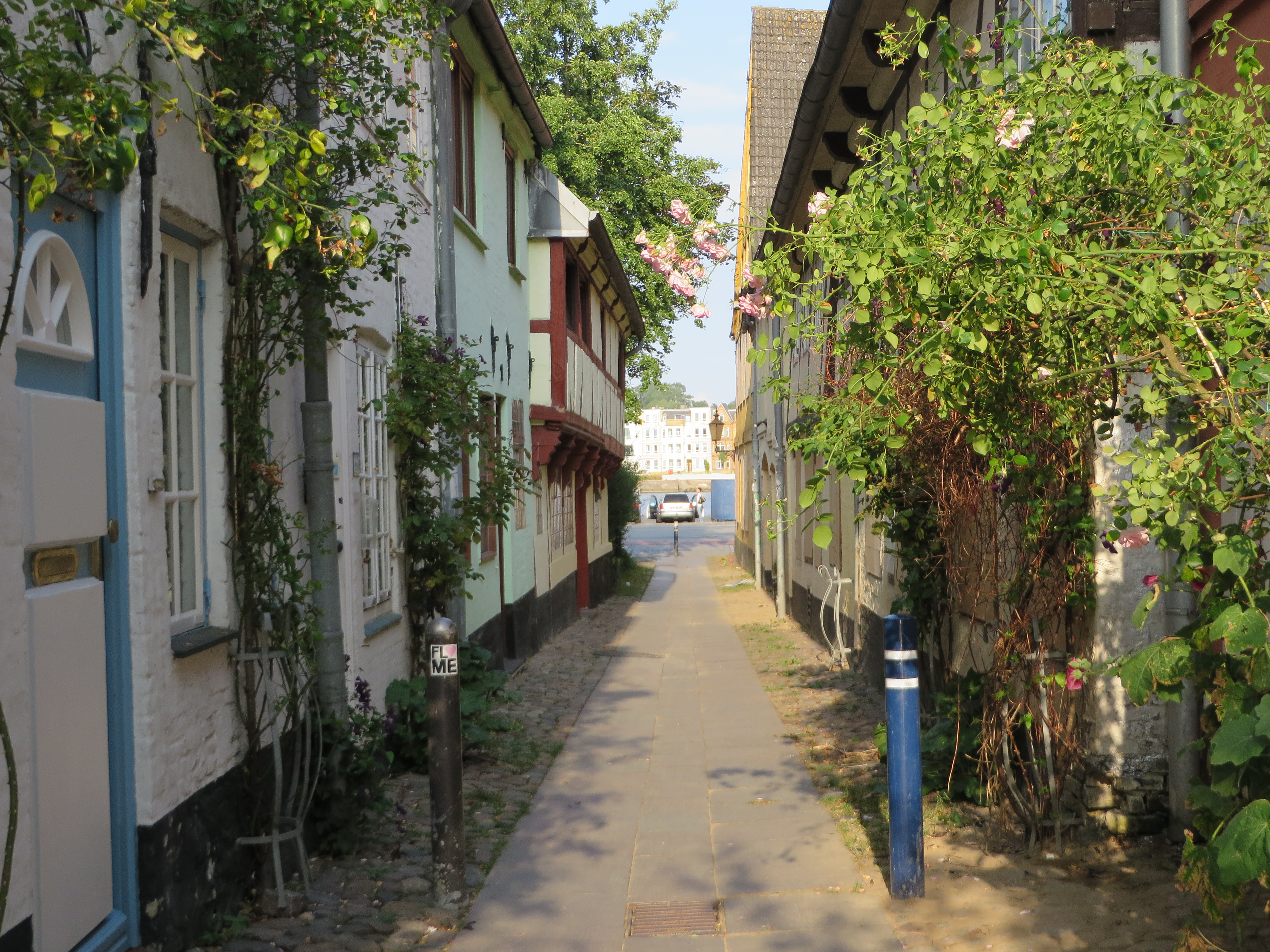 Herrenstall, Durchblick, am 31 Juli 2014 in Flensburg, Bild 07